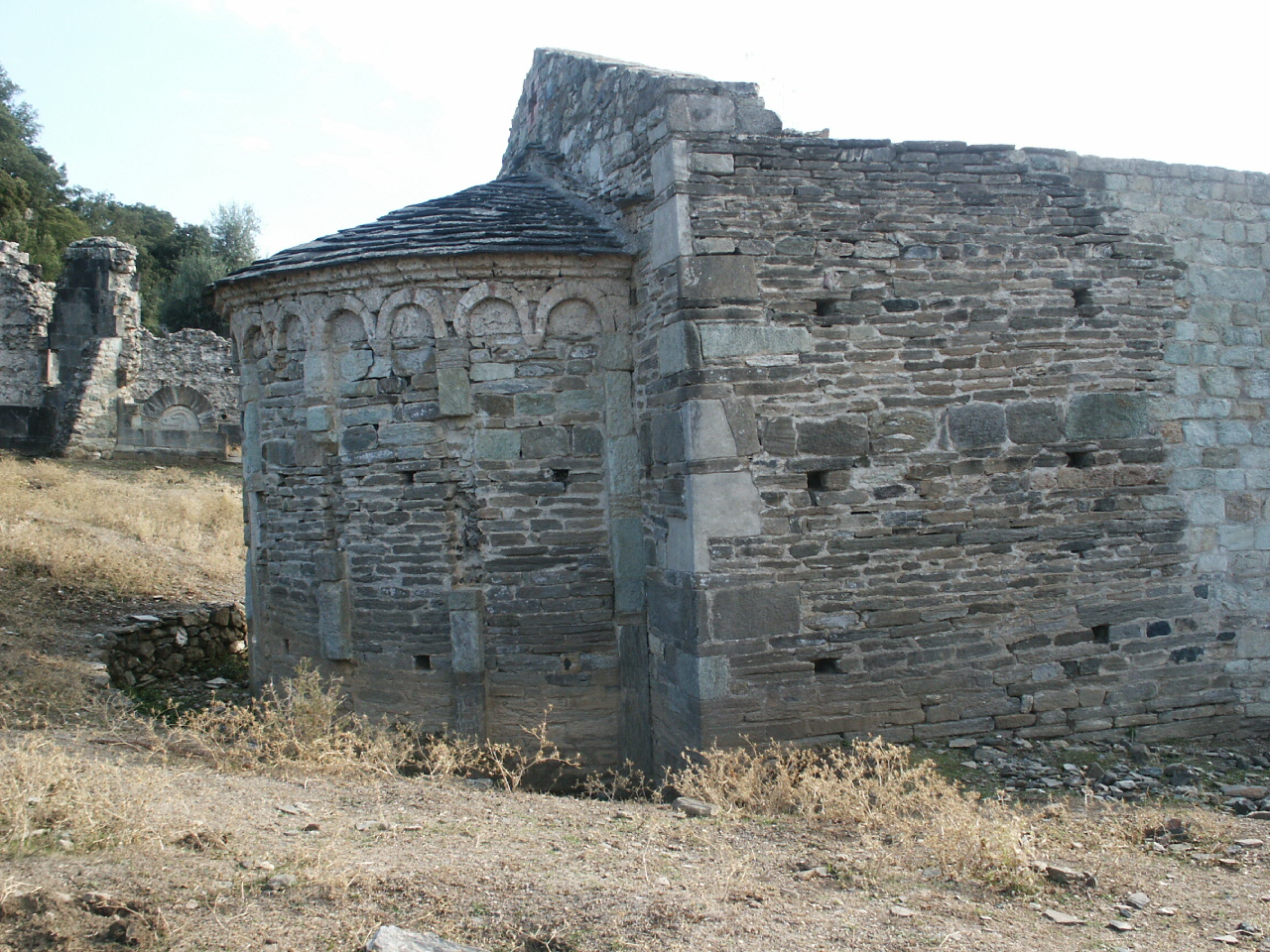 santa maria riscamone à valle di rustinu, corsica